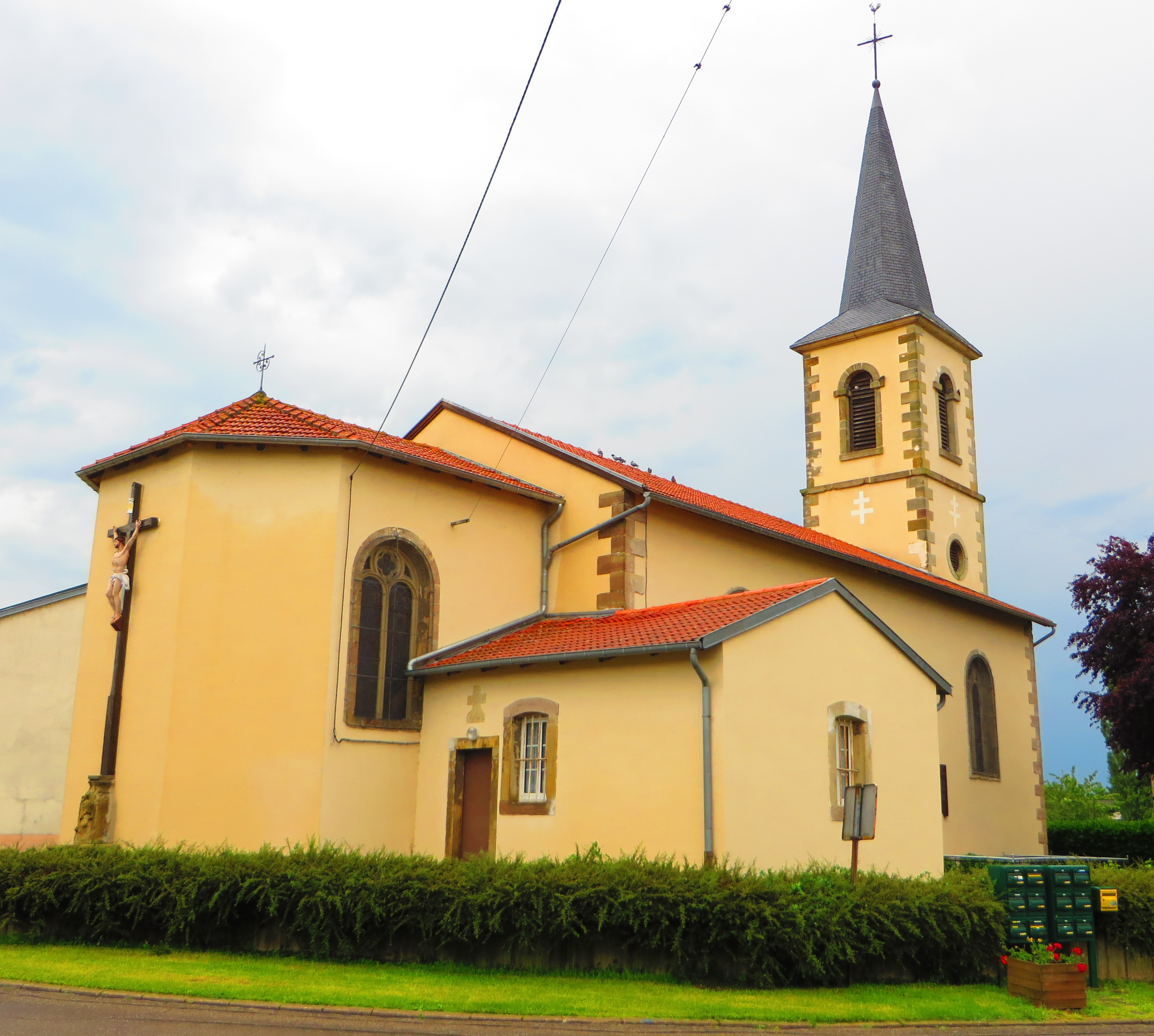 Vallerange Église Sainte-Gertrude-de-Nivelles